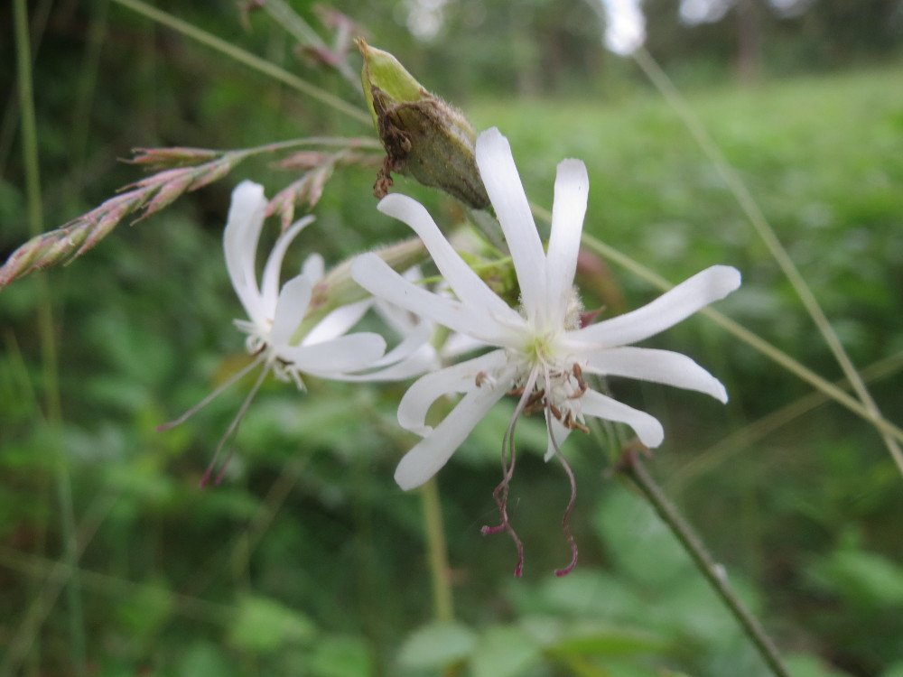 Nickendes Leimkraut (Silene nutans) auf dem Feldherrnhügel im Naturschutzgebiet „Oftersheimer Dünen“